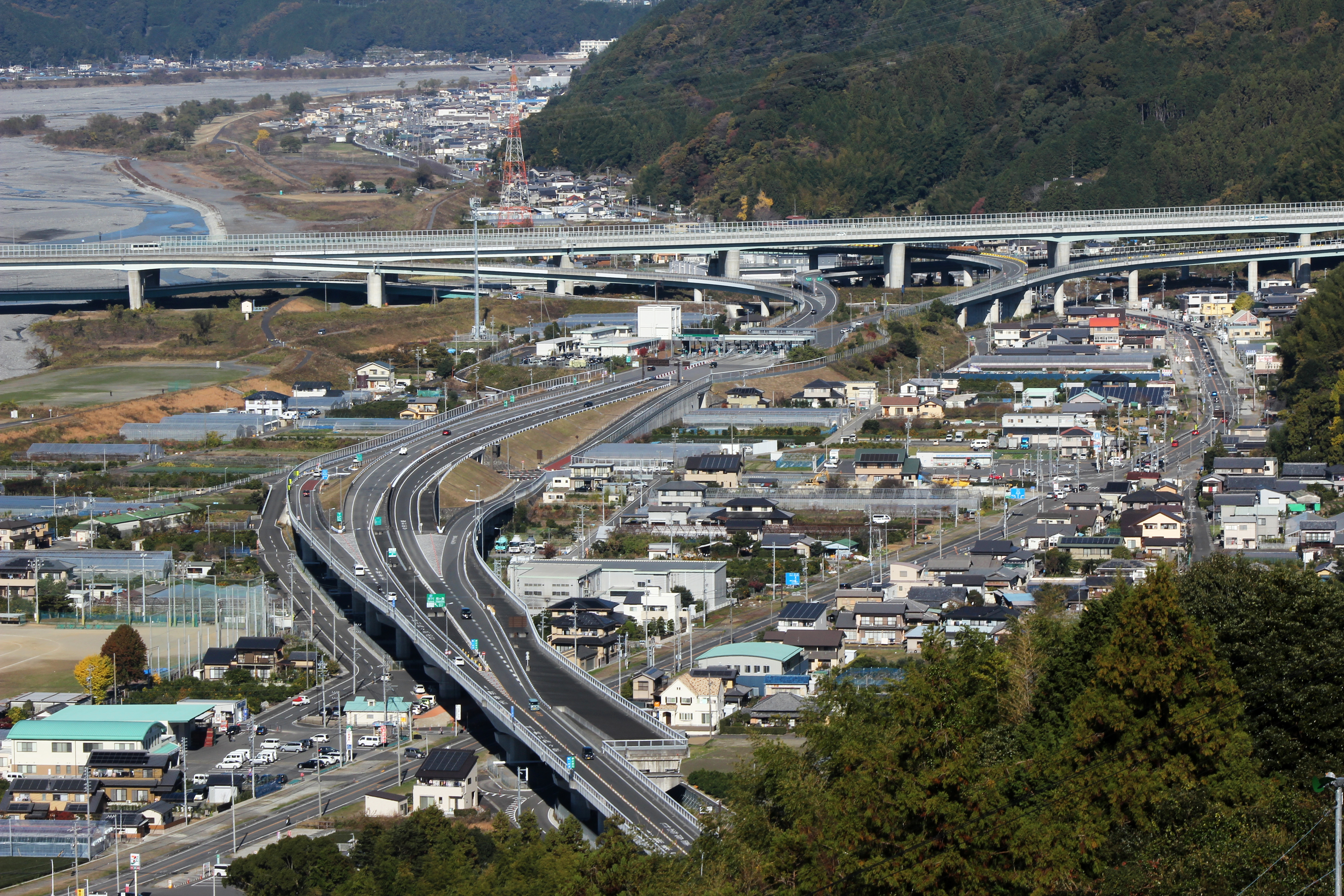 E1A新東名高速道路 新静岡インターチェンジ